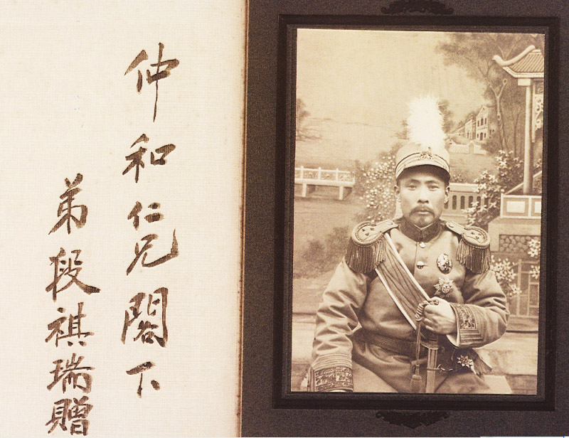 段祺瑞赠章宗祥照片